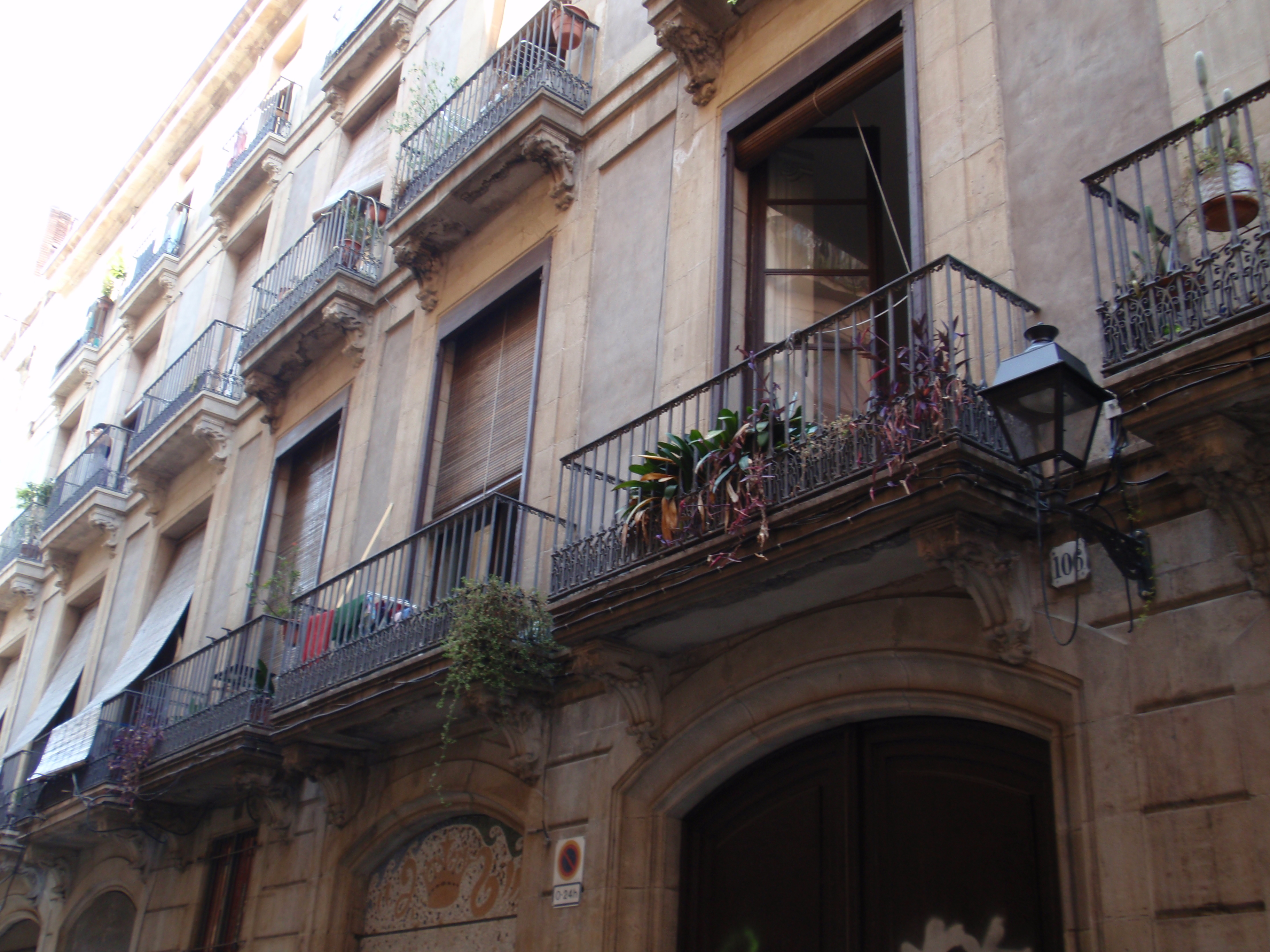 Casa Erasme de Gònima. C/ Carme, 106 (Barcelona)